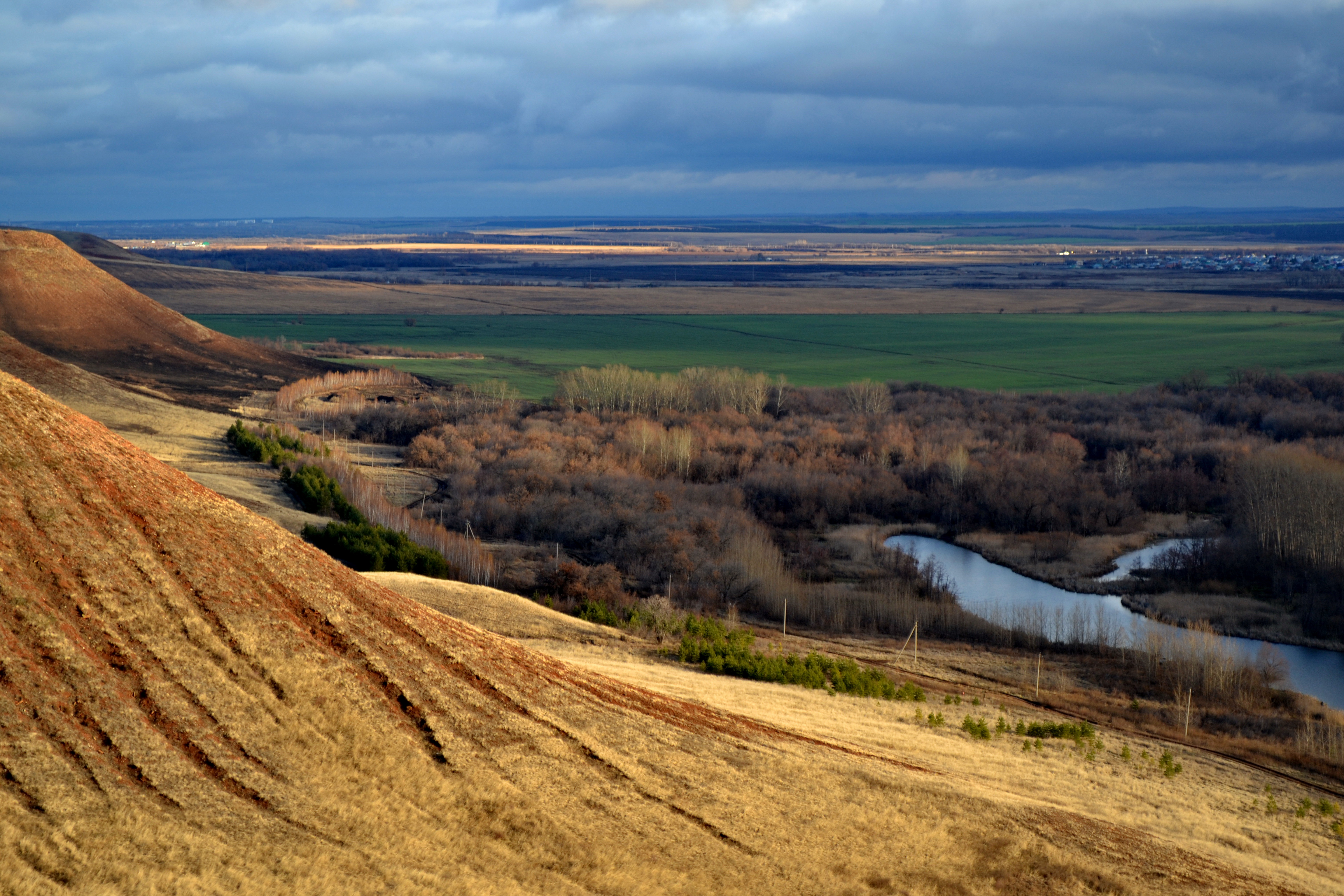 Гора Копейка: 1 км севернее г. Похвистнево, 0,5 км восточнее с. Старопохвистнево,Старопохвистнево,Похвистневский район, Самарская область This image is related to the protected area of Russia number 6310880